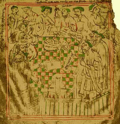 Стол накрытый клетчатой тканью, за которым восседают счетоводы